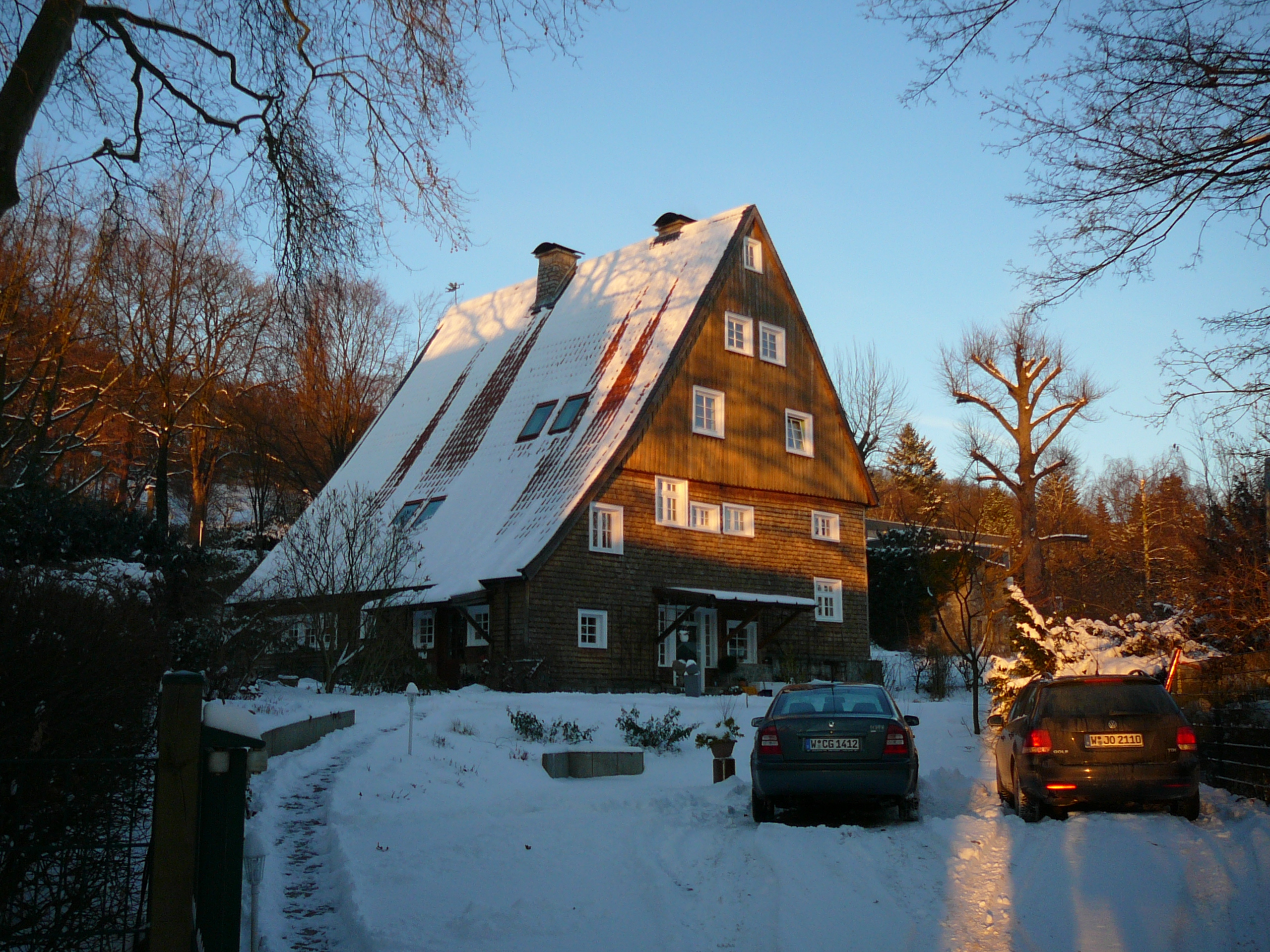 Melanchthonstraße, Wuppertal